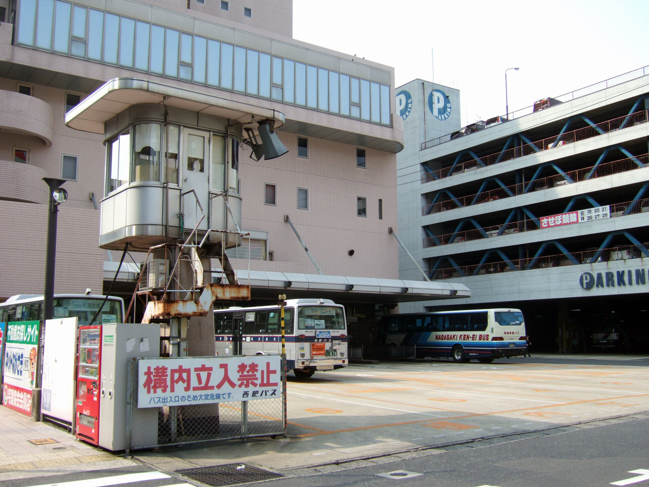 西肥バス佐世保バスセンター